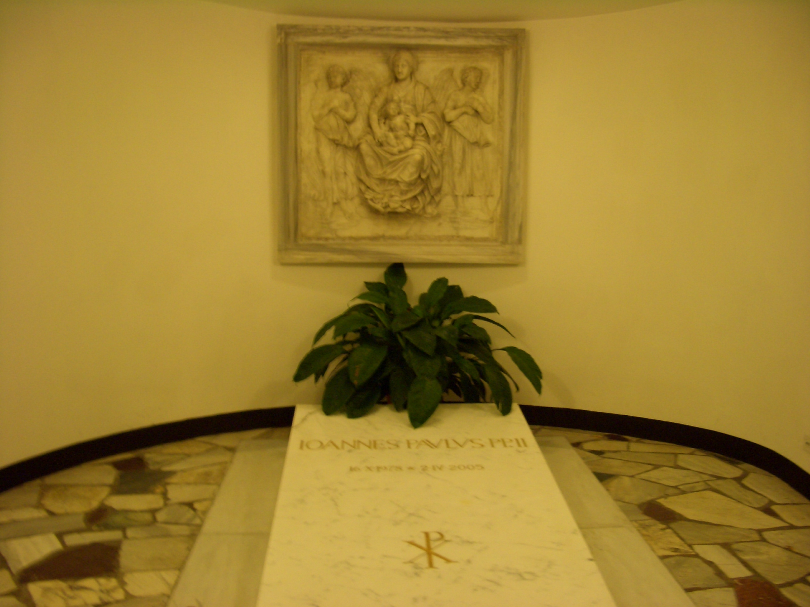 Fotografía tomada con mi cámara en la que se observa al lugar donde yacen los restos de Juan Pablo II, en las criptas del Vaticano.